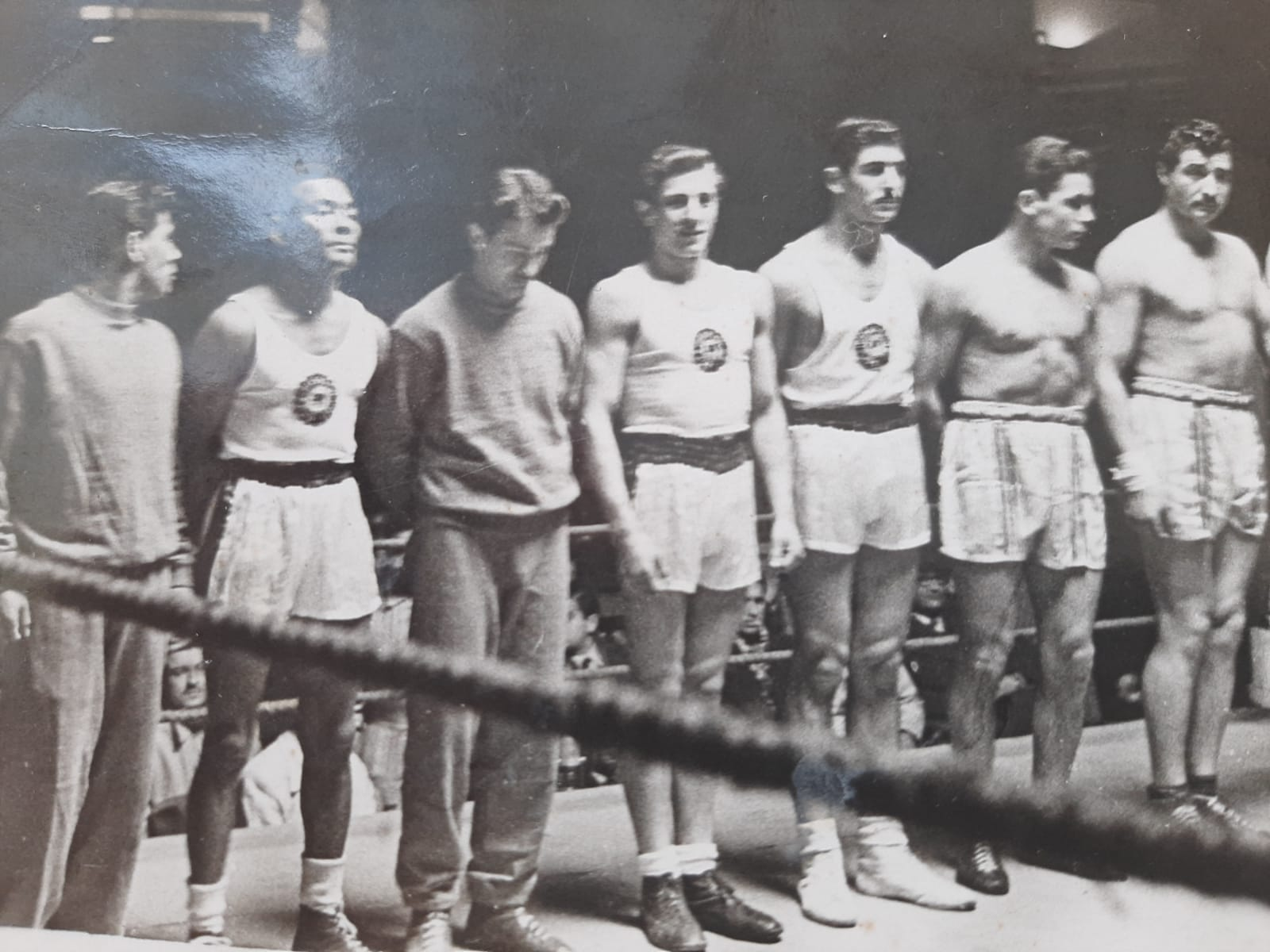 Enver Angün Mlli Takımla Seronomiyle birlikte.